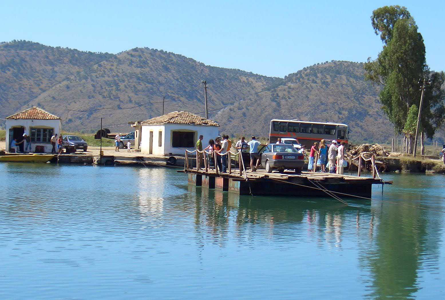 Fähre am Vivar-Kanal bei Butrint (Albanien).